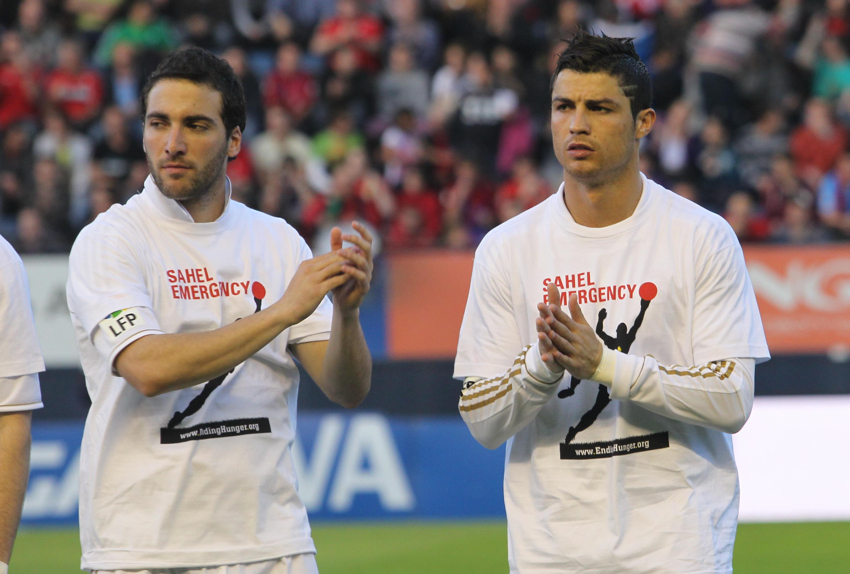 Temporada 2011/2012.Campeonato de Liga de Primera Division-Liga BBVA.31ºJornada.Sabado, 31 de marzo de 2012.Estadio Reyno de Navarra, Pamplona, Navarra, Spain..Partido disputado esta tarde en Pamplona entre Osasuna y R.Madrid..Los jugadores del R.Madrid y Osasuna han participado en la campaña "El Futbol Profesional contra el Hambre"..En la imagen el portuges Cristiano Ronaldo e Higuain.asi como la plantilla de Osasuna y R.Madrid.